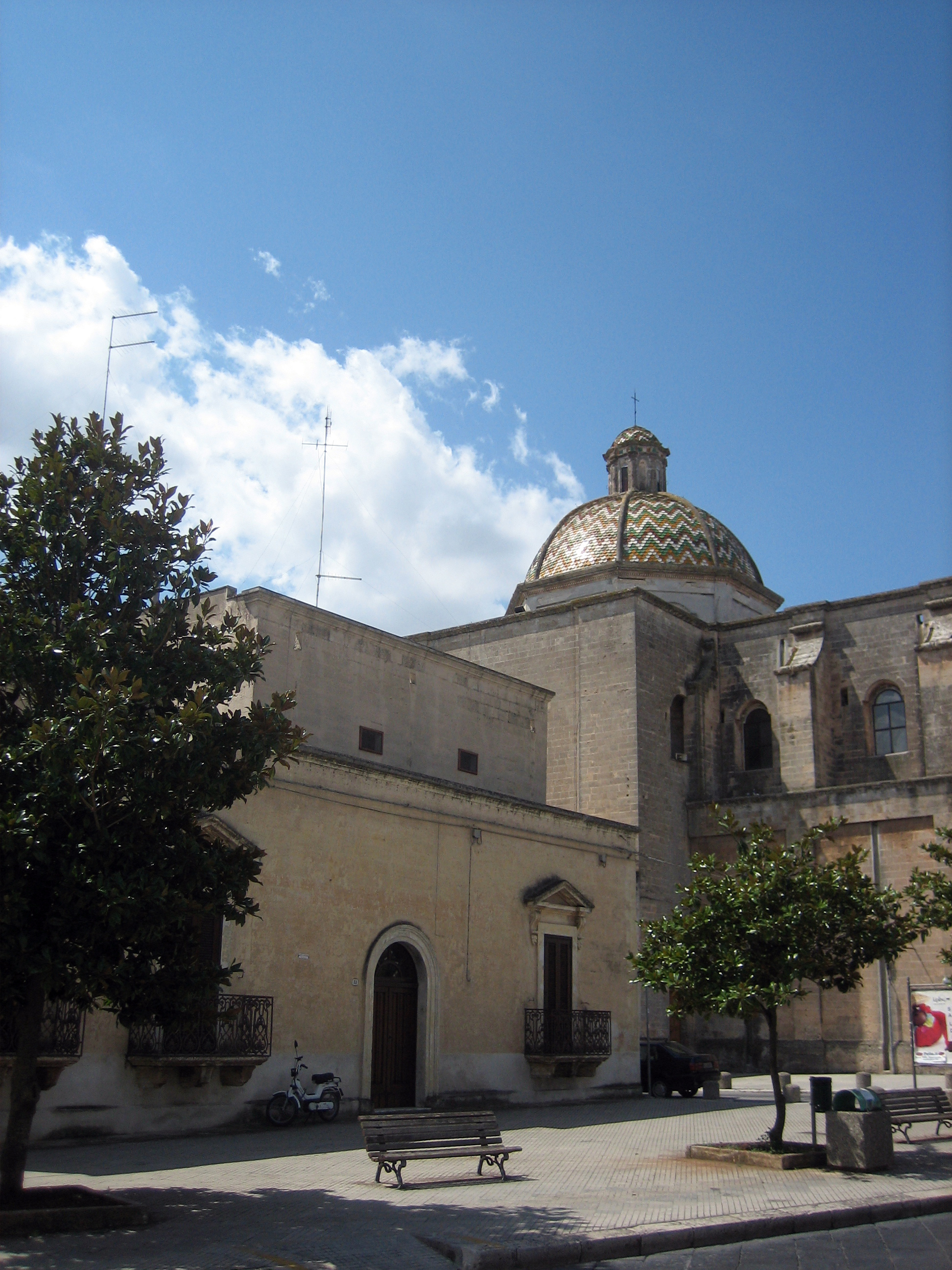 Manduria, Puglia, Italia